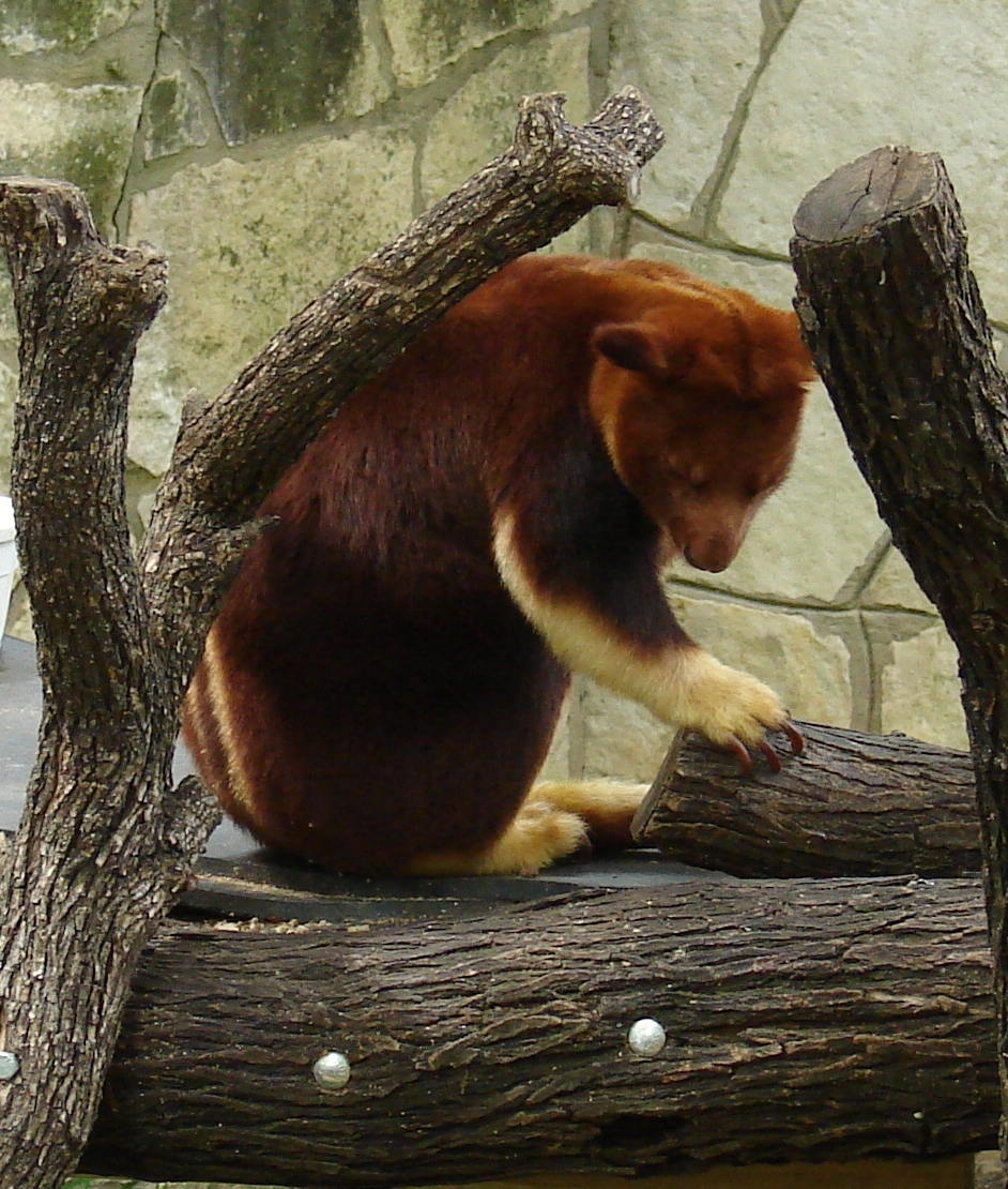 Taken at San Antonio Zoo